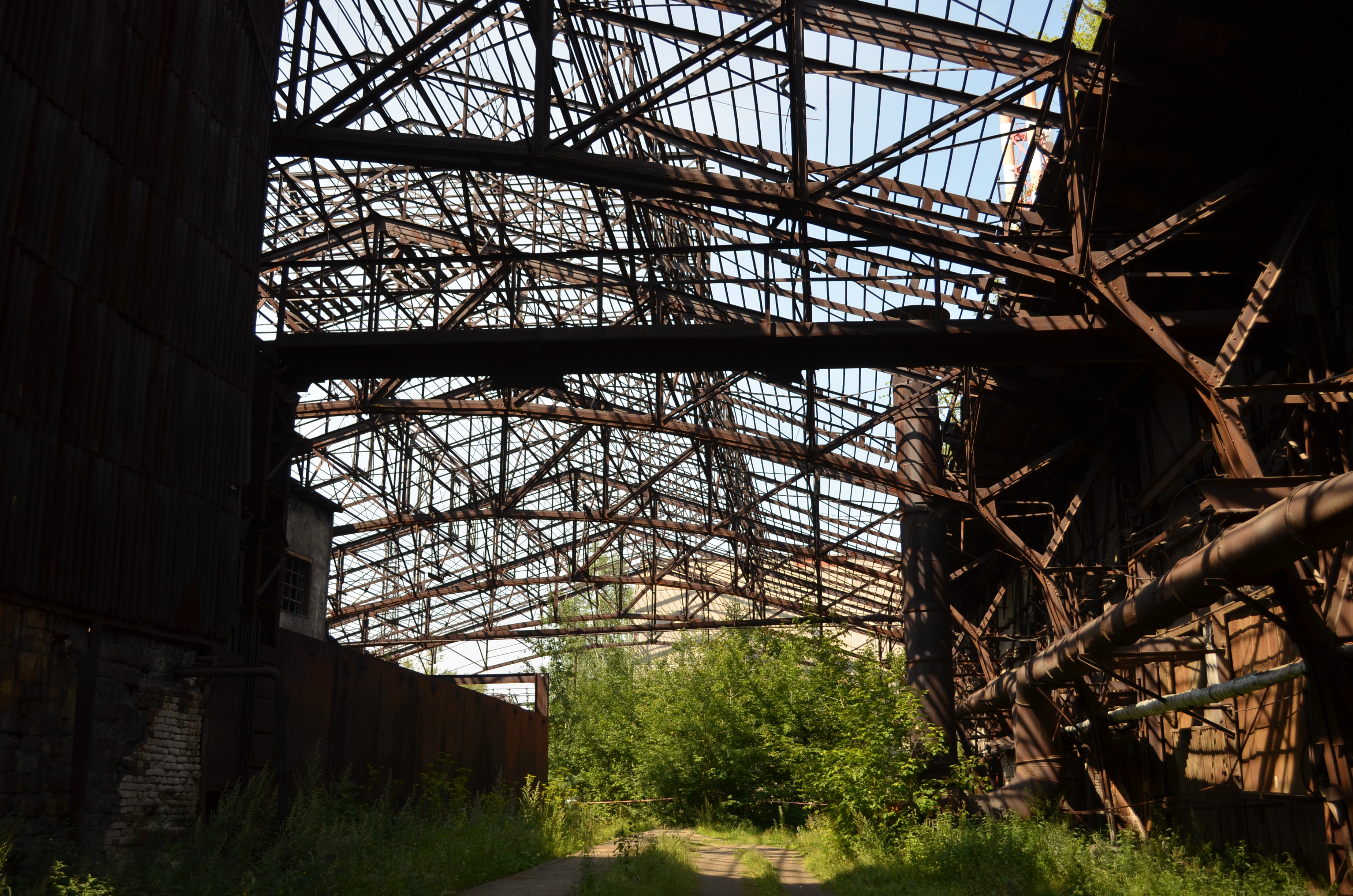 энергоцех (Свердловская область, Нижний Тагил, завод им.Куйбышева)